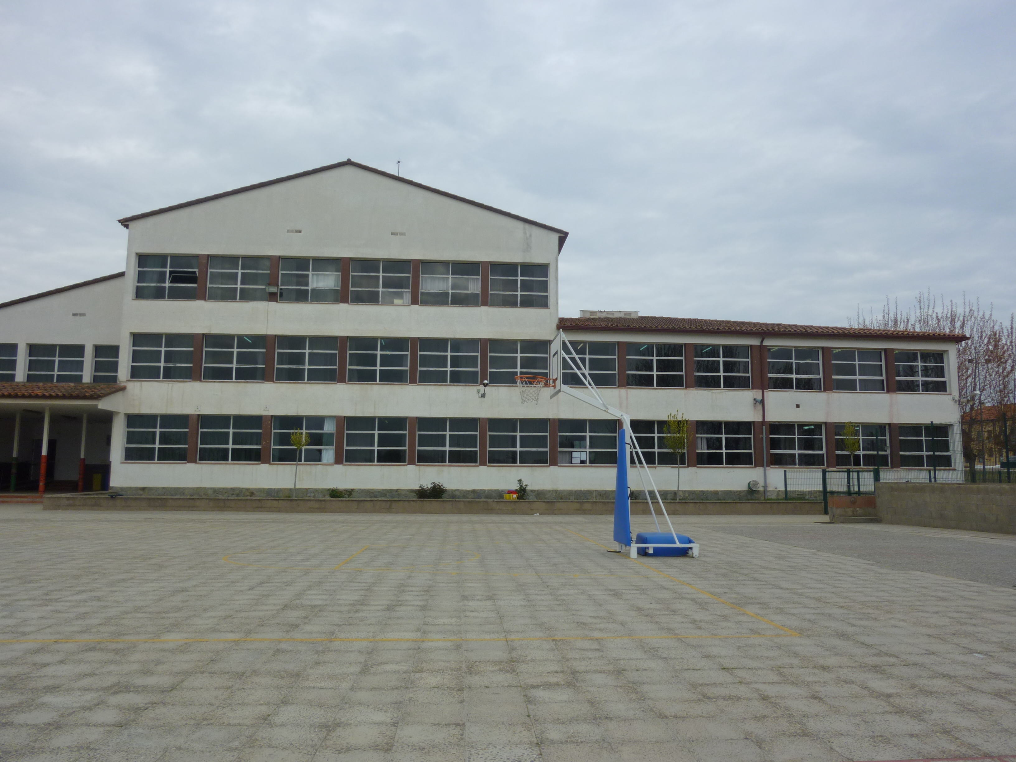 Edifici Escola Vila-romà de Sant Joan de Palamós